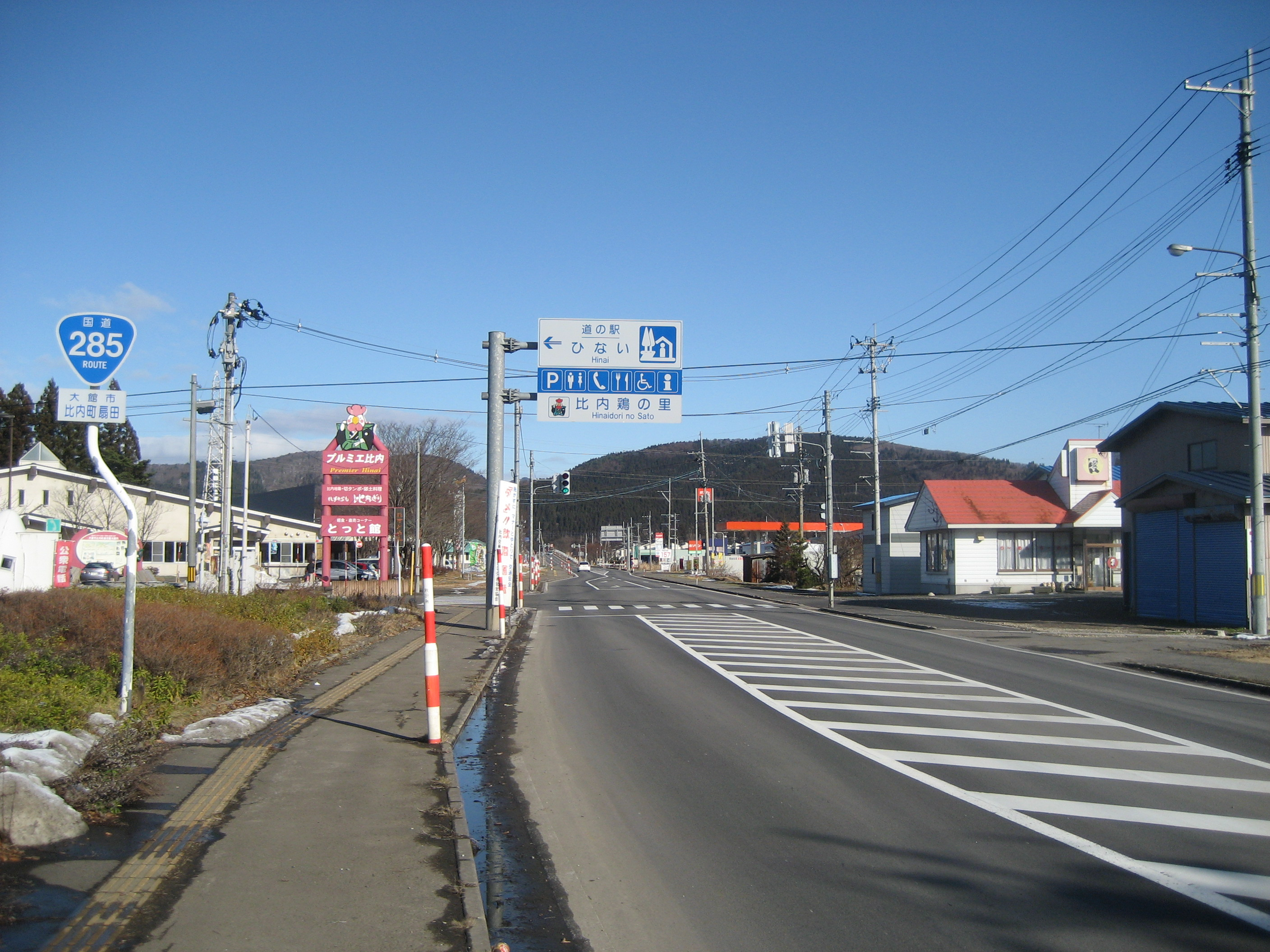 国道285号線秋田県大館市比内町扇田付近